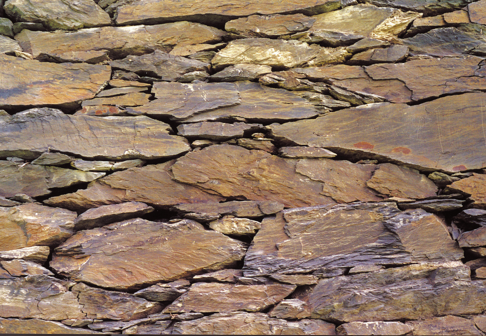 Detail aus Terrassenmauer 'Grub' in den Niederfeller Fächern